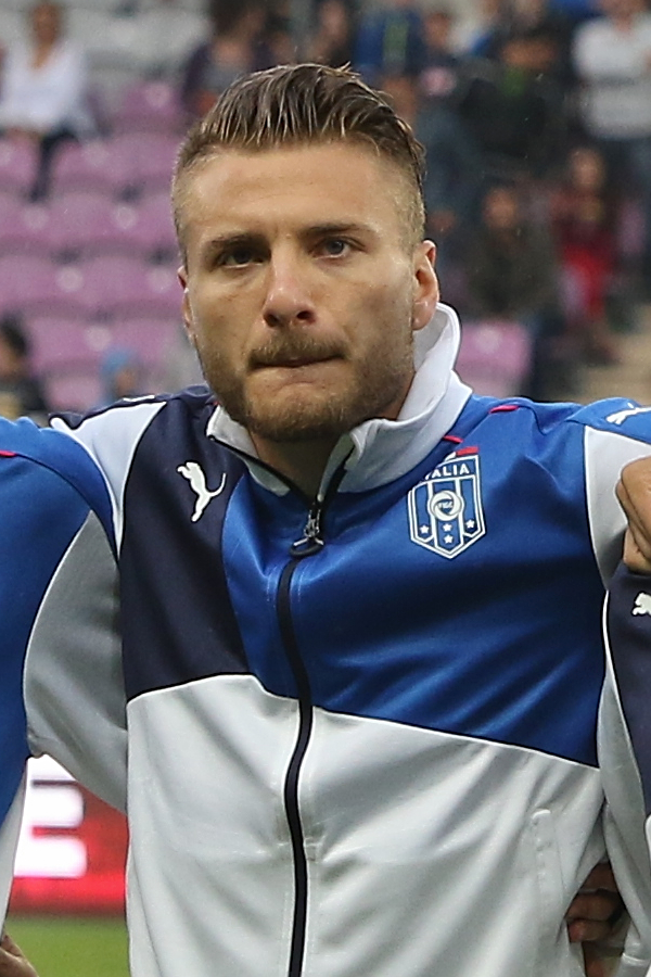 20150616 - Portugal - Italie - Genève - Ciro Immobile